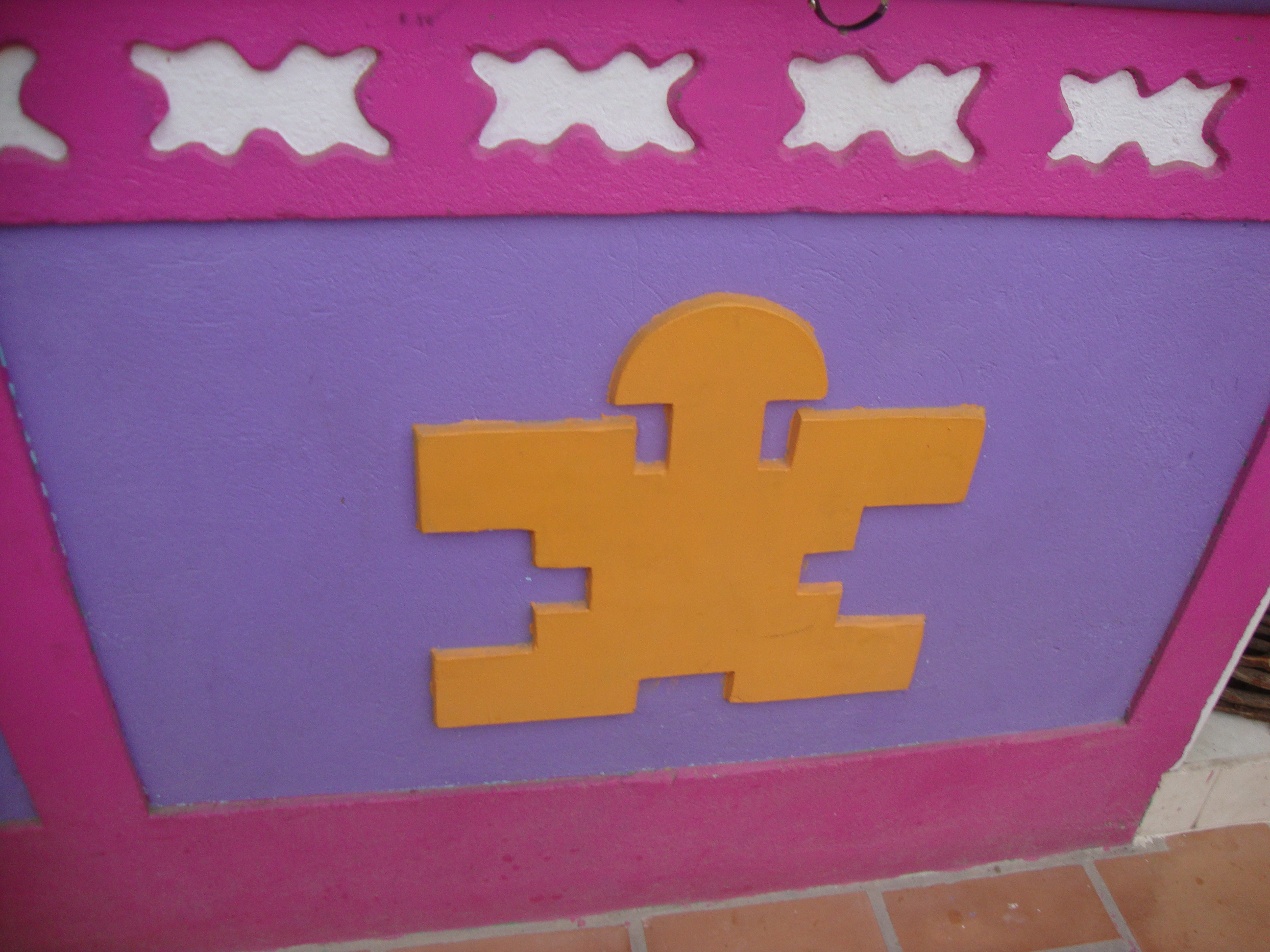 Zócalo de Guatapé, Antioquia.